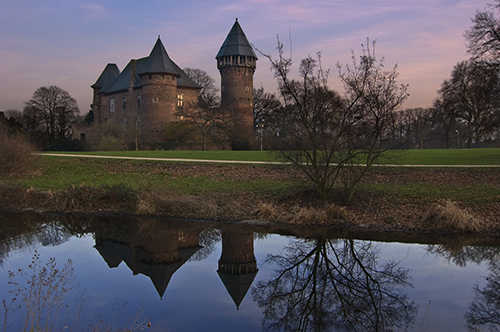 Burg Linn bei Sonnenuntergang